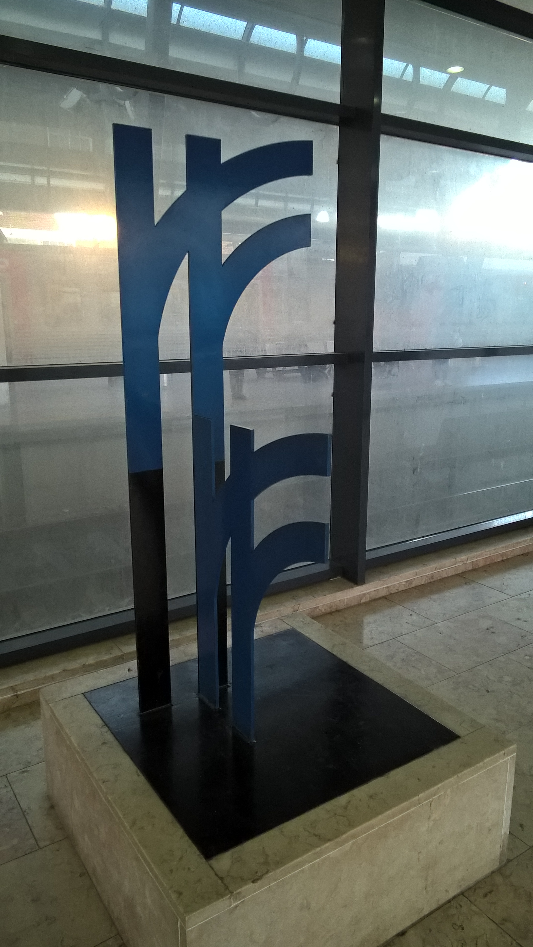 Agualva-Cacém train station escultura